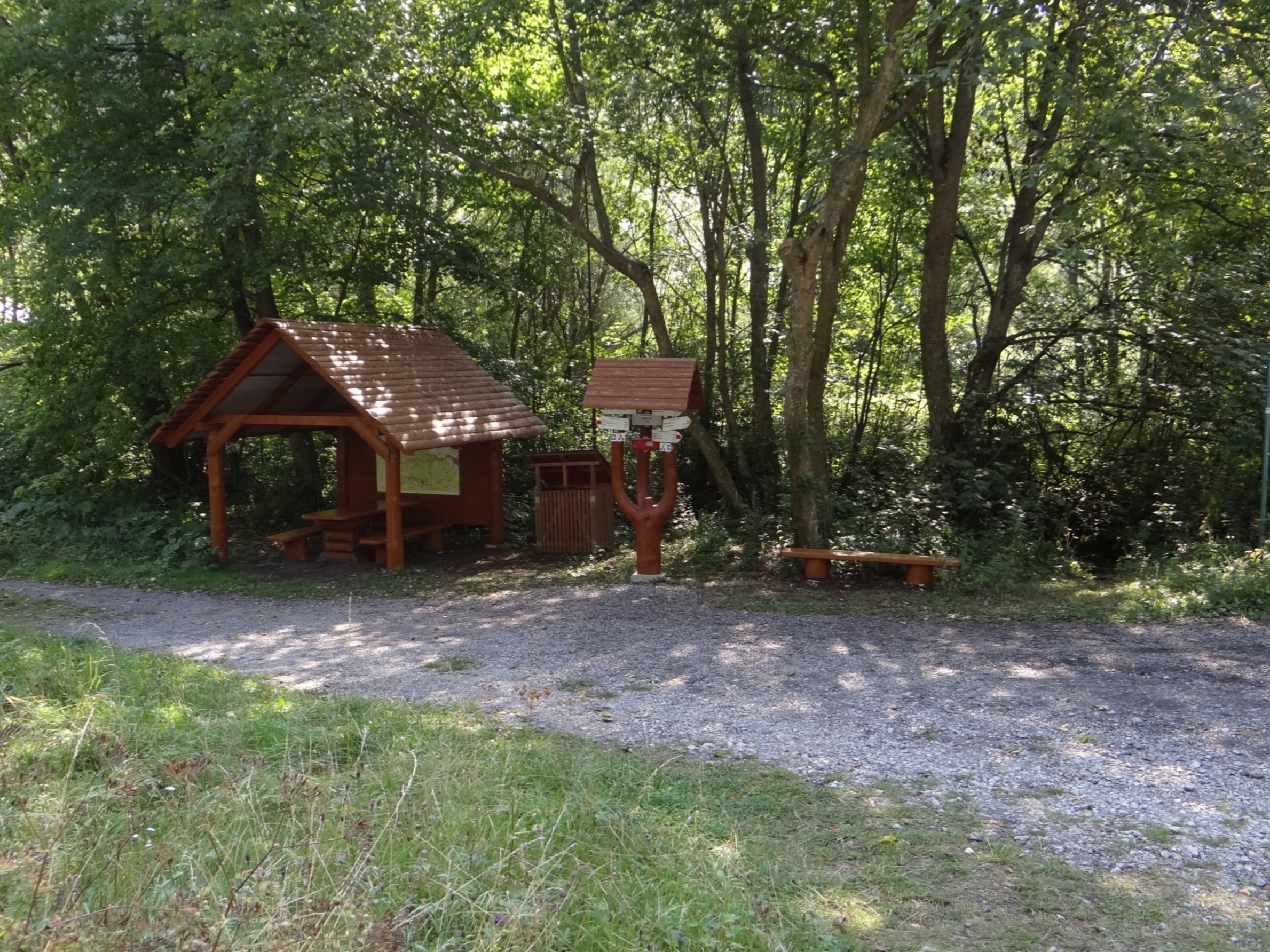 Štvrtocká píla (Horáreň Sokol). Punkt startowy szlaku turyst. doliną Veľký Sokol